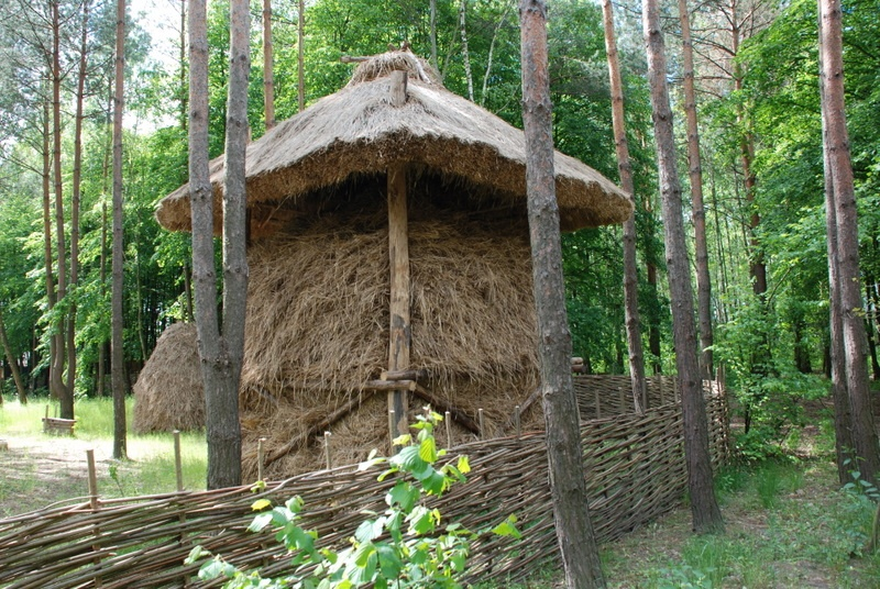 Оборіг